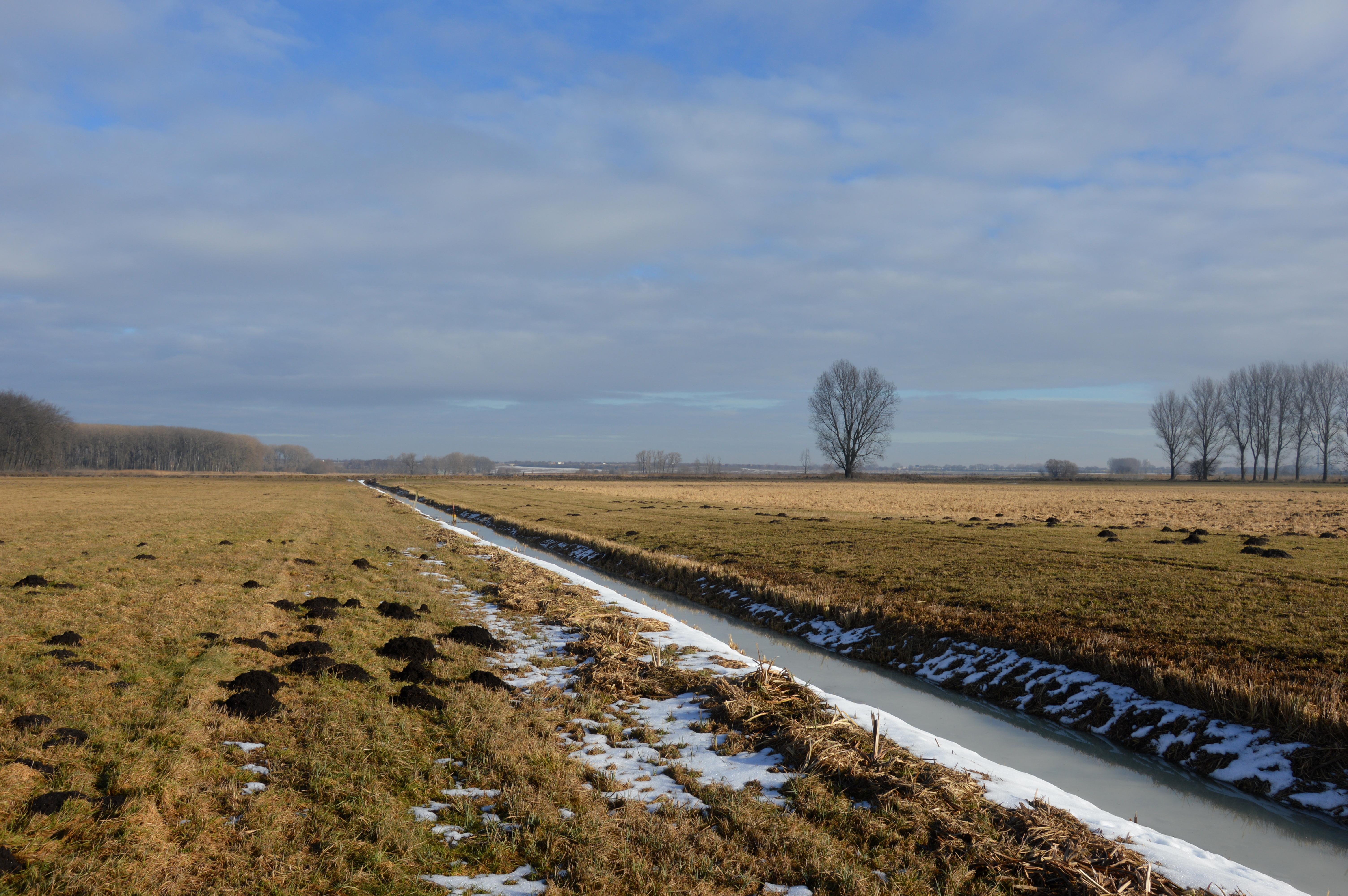 Graben im Selschen Bruch